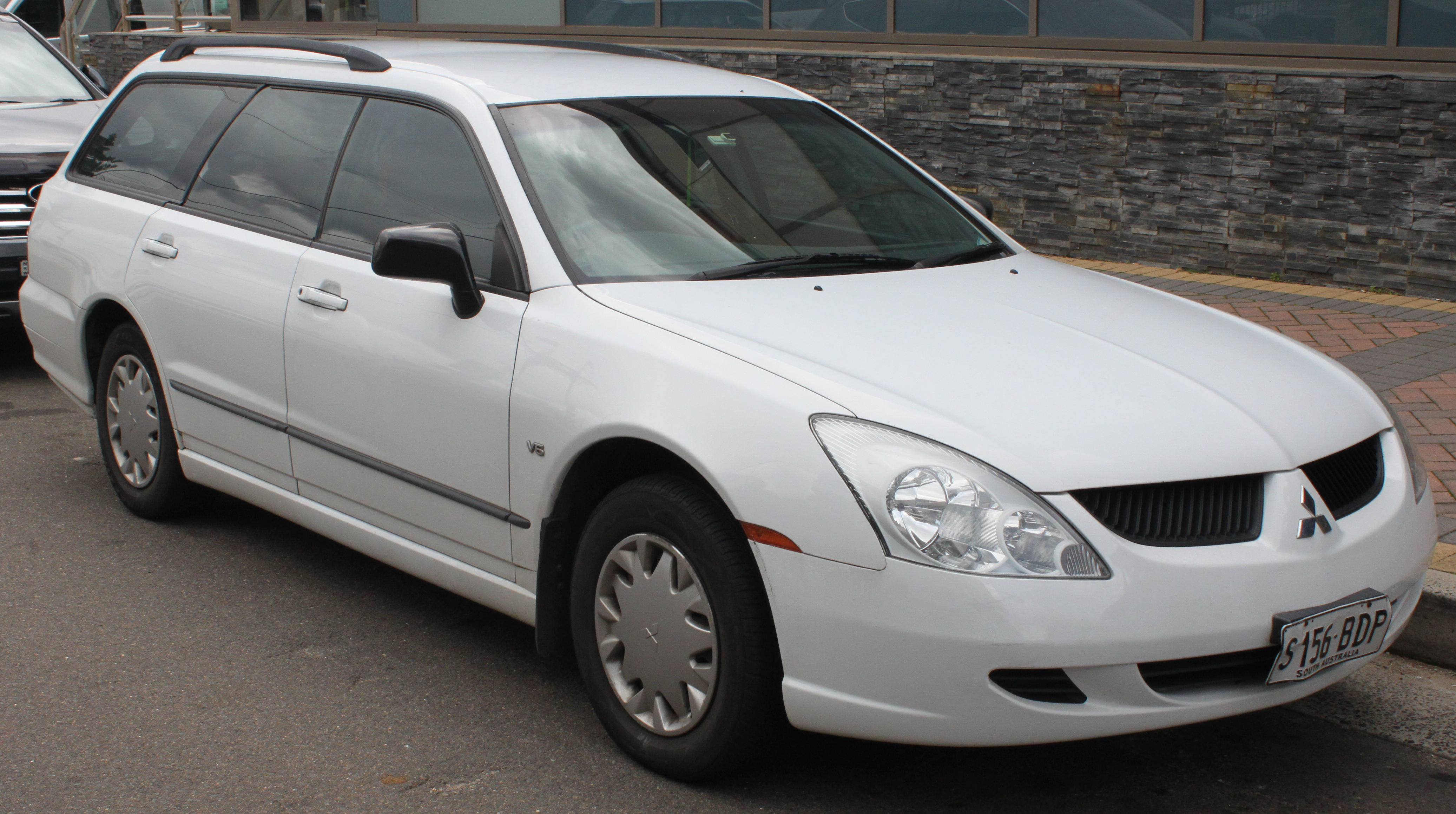 Mitsubishi Magna TW ES Wagon